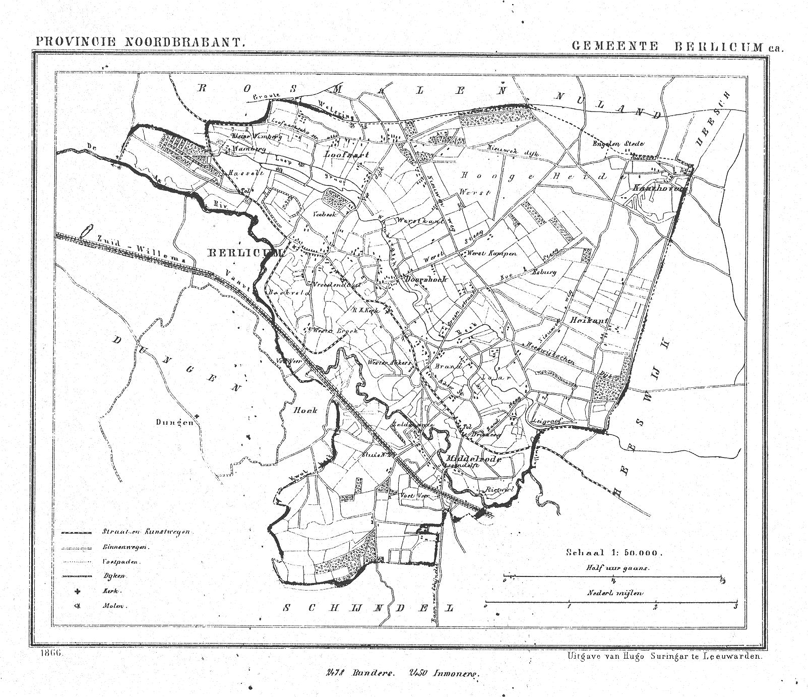 Nederland, Noord-Brabant, Gemeente Berlicum